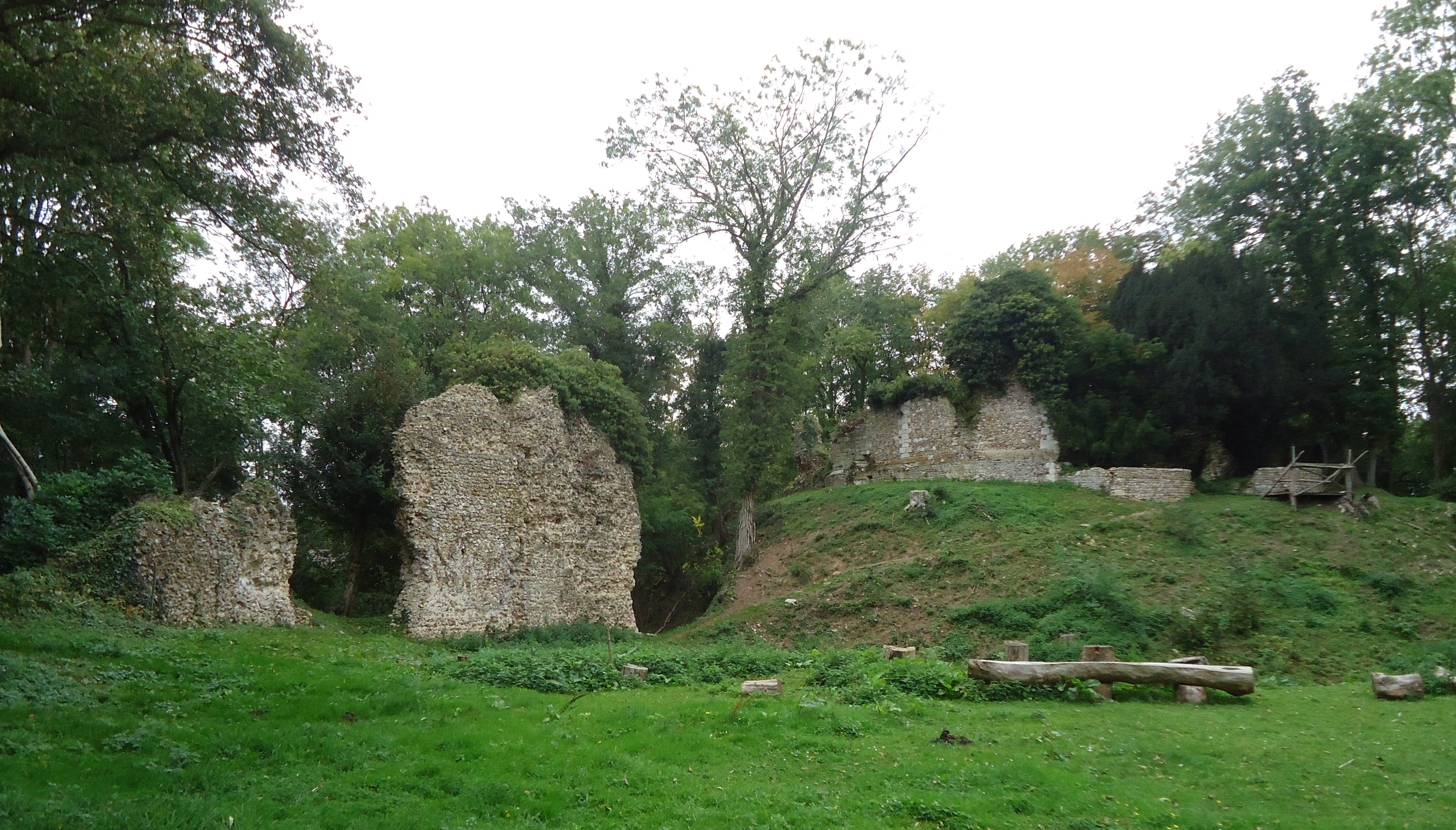 Motte castrale et ruines du château médiéval d'Avrilly XIe, XIIe (ISMH)